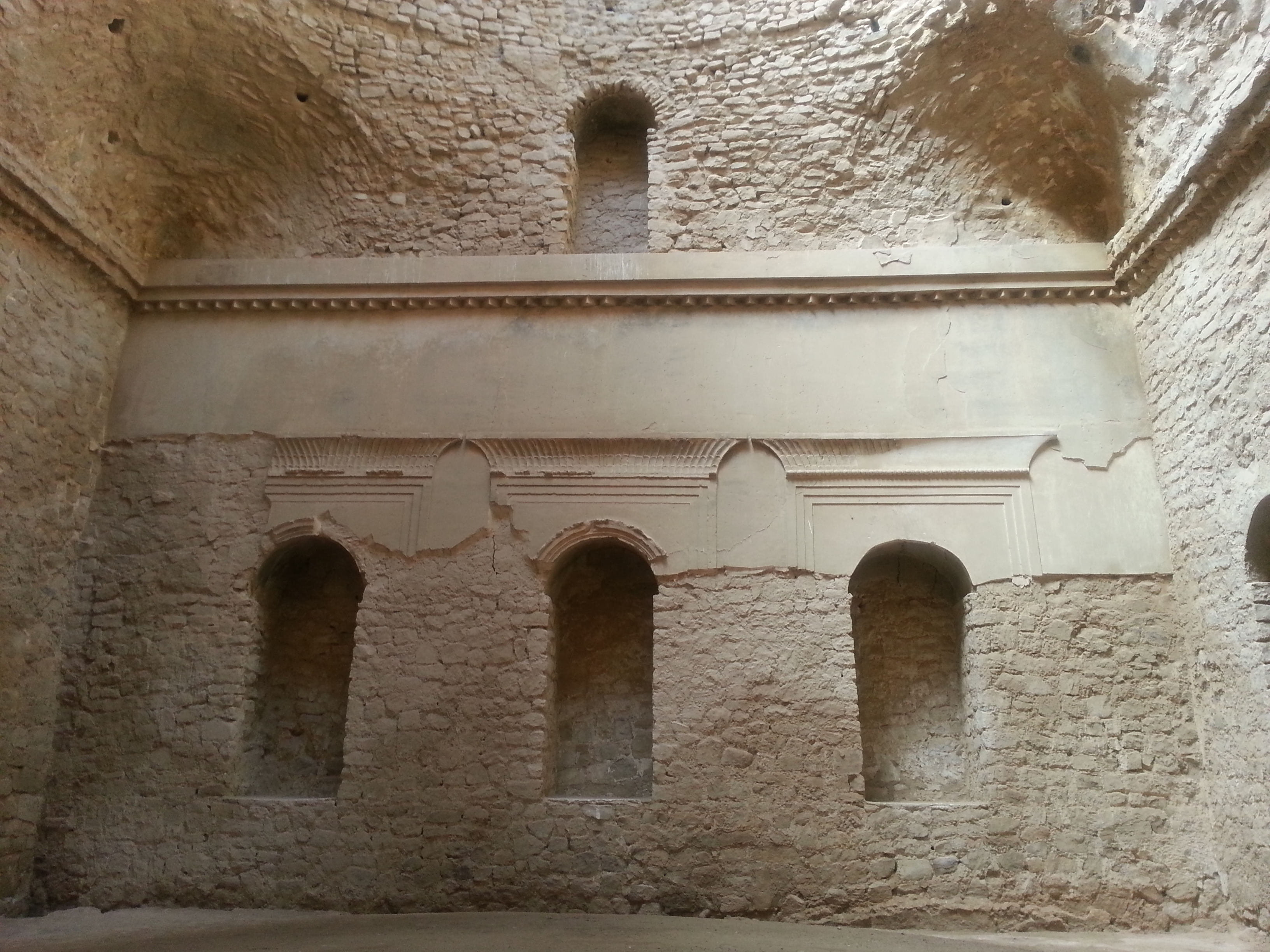 Ardeshir Palace, Firoozabad, Fars (کاخ اردشیر ساسانی، فیروزآباد، فارس)